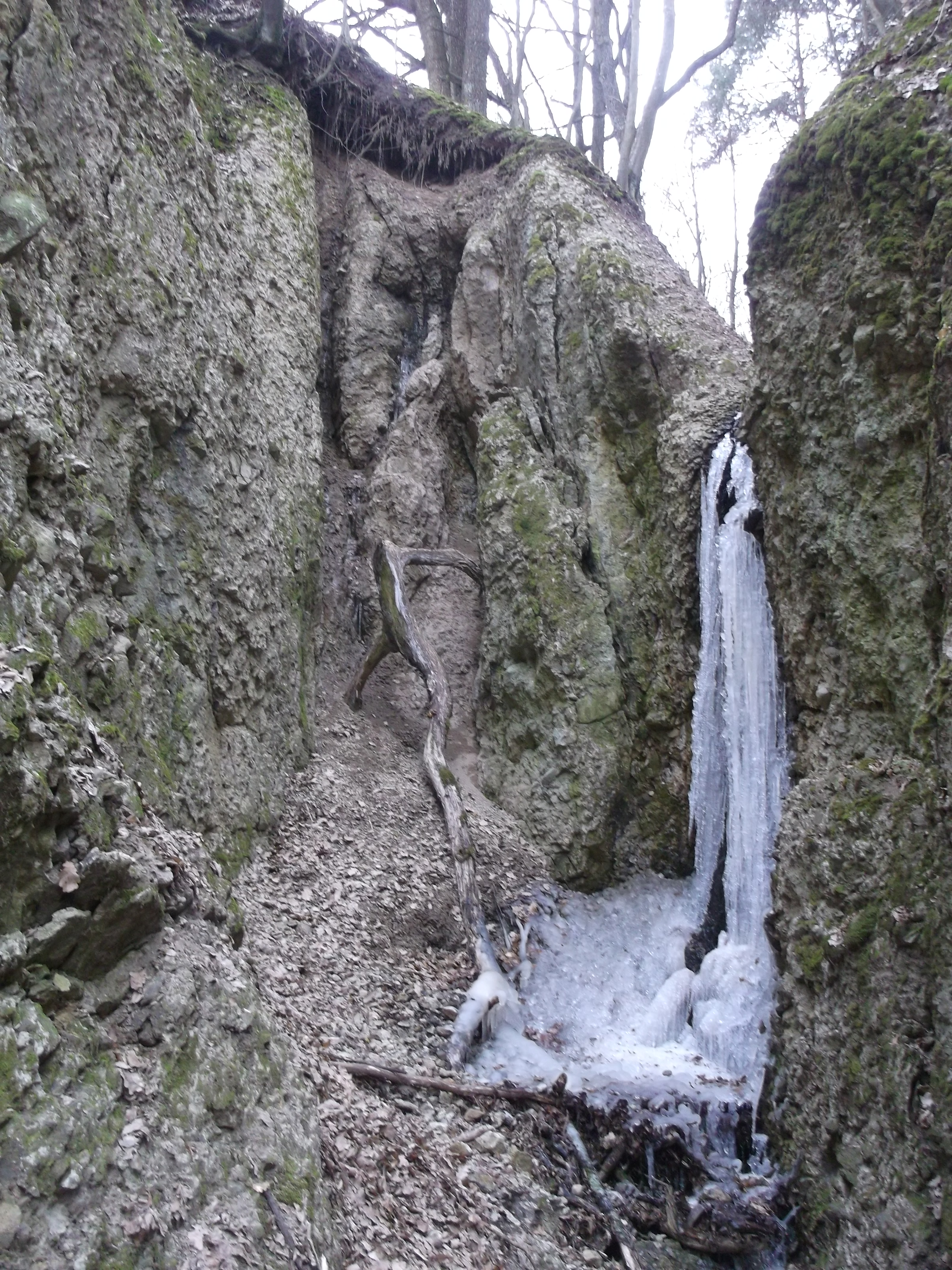 Samporský vodopád